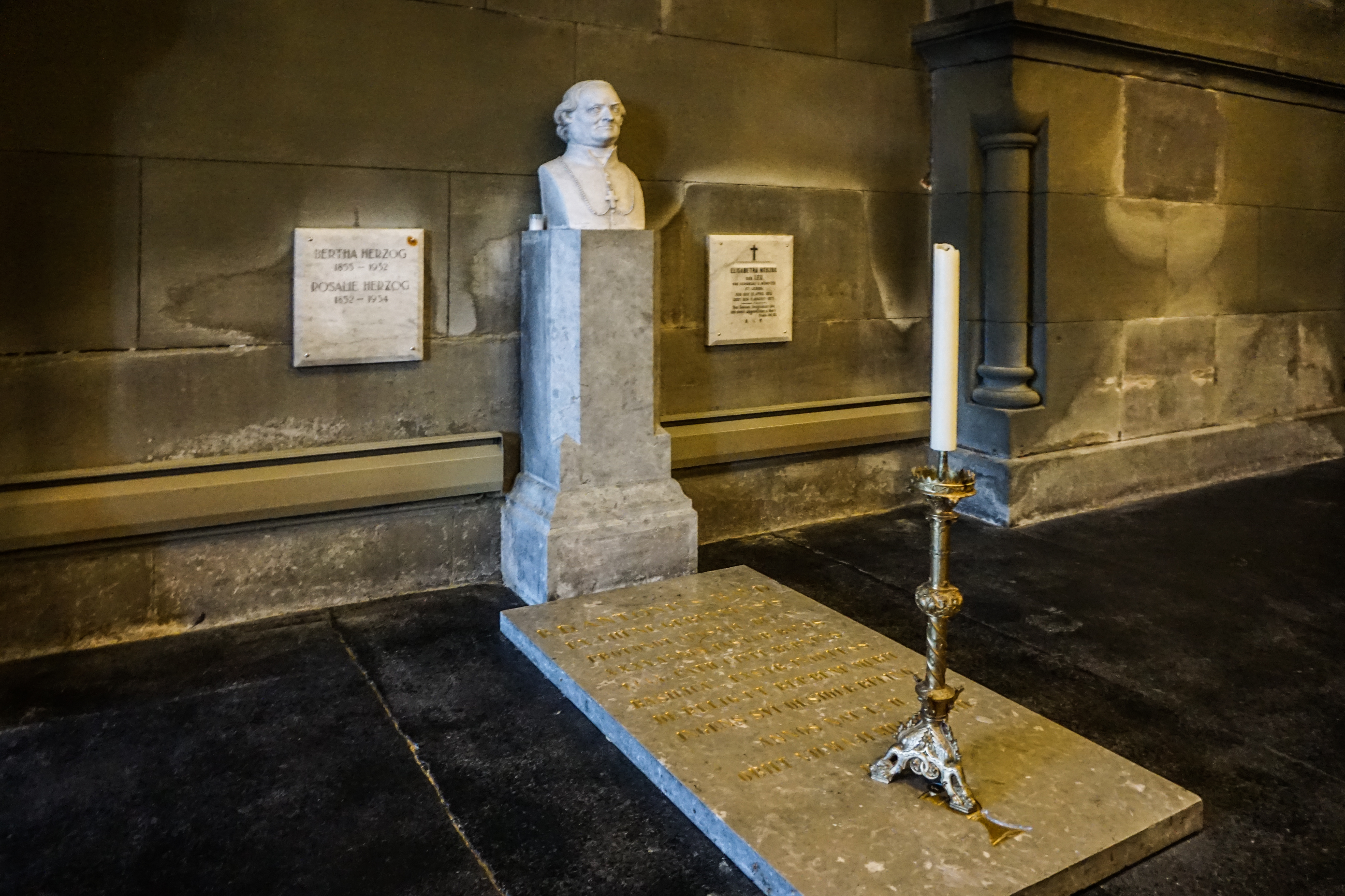 Grabmal von Pfarrer Antoine Baud in der Krypta von